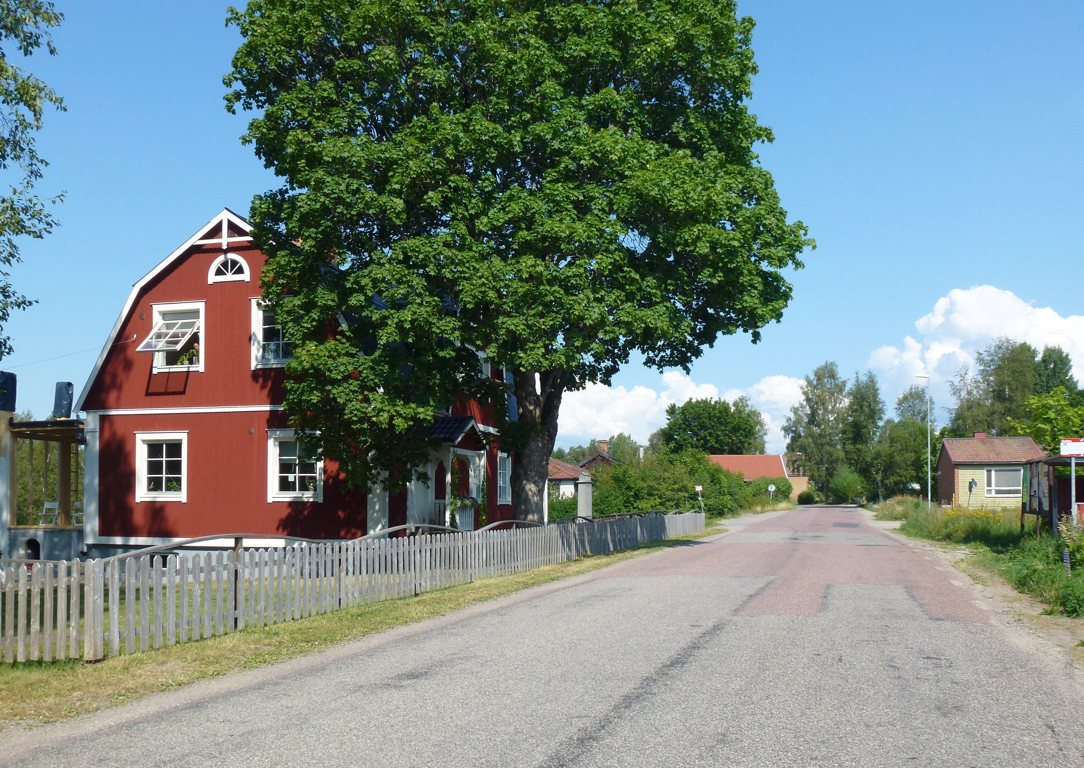 Gubbo, tätort i Smedjebackens kommun